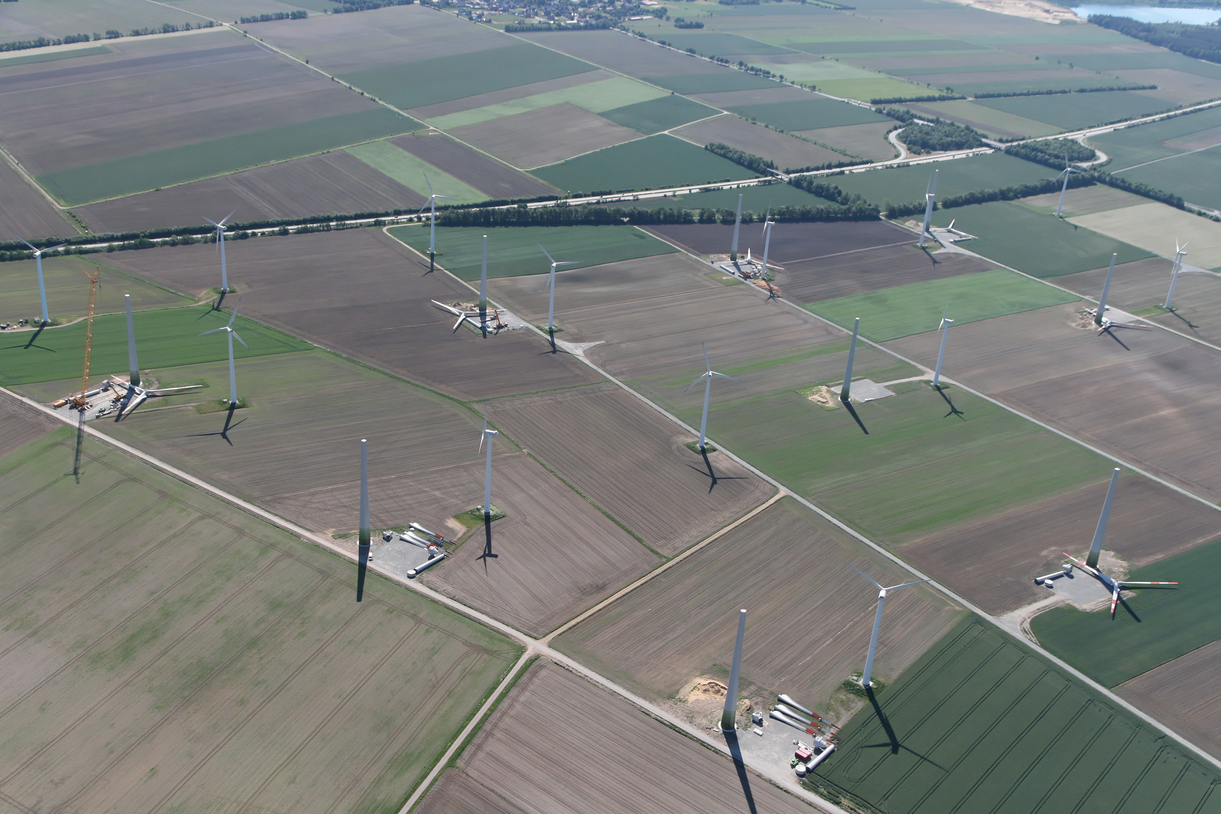 Windpark Holßel bei Neuenwalde (Hintergrund), Gemeinde Geestland, Landkreis Cuxhaven.